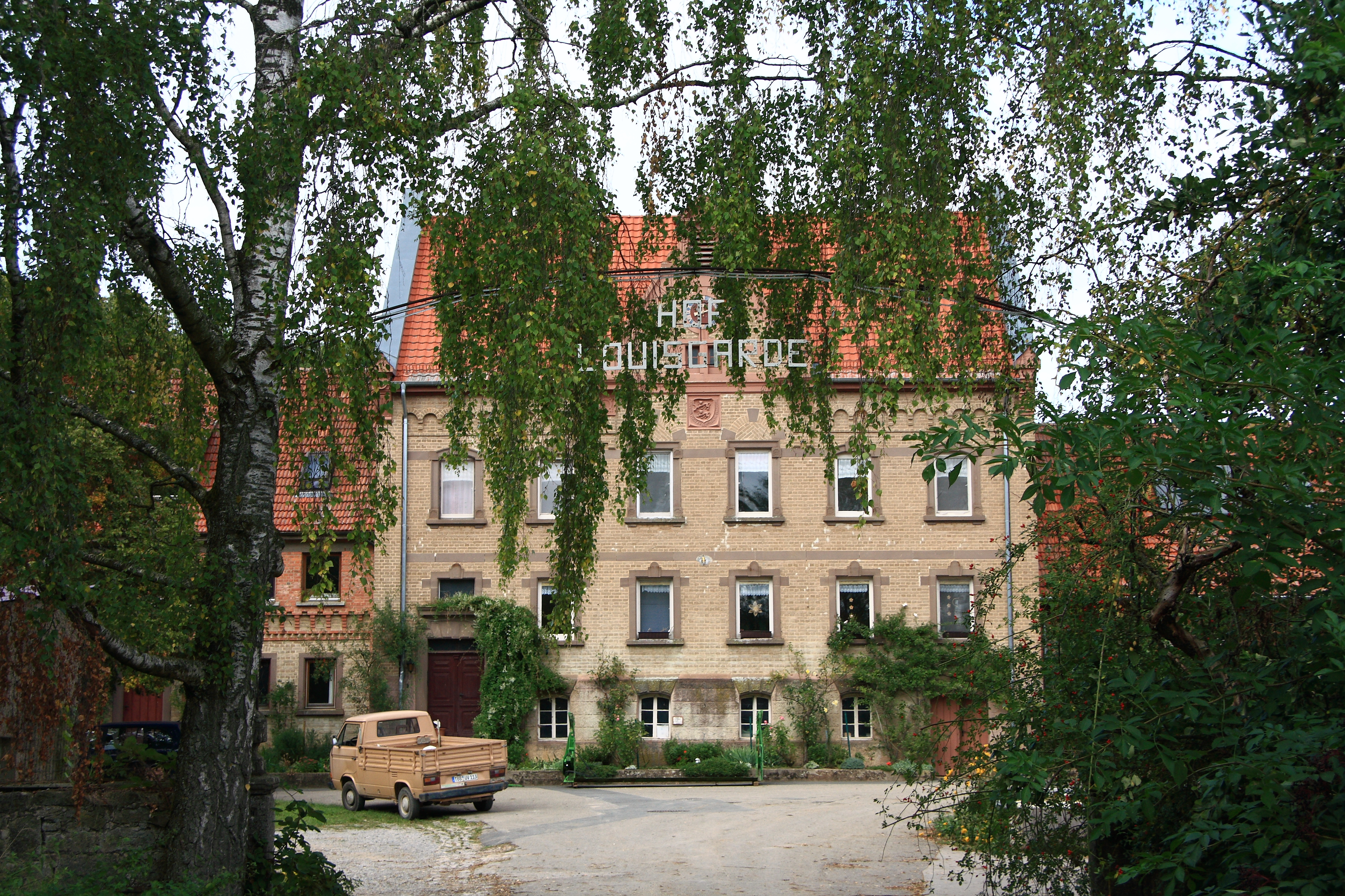 Louisgarde ist ein ehem. Kloster und spätere hohenlohische Domäne. Massives Herrenhaus mit Zwerchgiebel und Uhr. Der Wapenstein ist von 1902 bez.